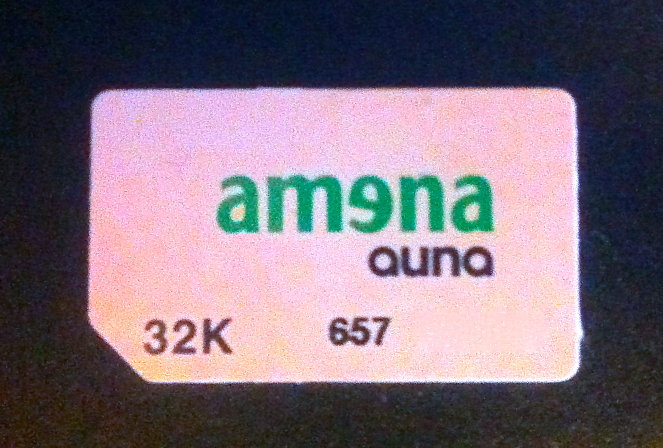 Tarjeta SIM antigua de Amena